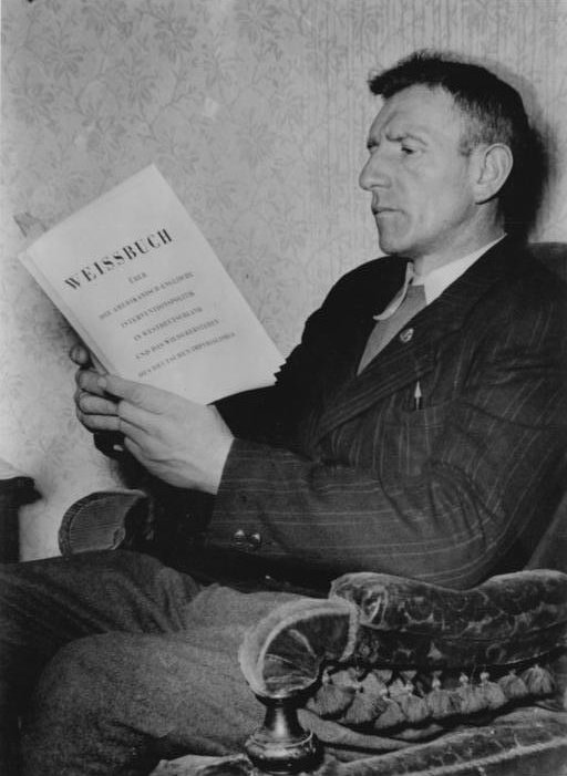 This description has been identified as biased or incorrect: GDR propagandaZB-Paalzow 1.2.1952 Meisterbauer Schimke aus Löbersdorf bei Bitterfeld. (siehe Begleittext). UBz: Neben seiner anstrengenden landwirtschaftlchen Tätigkeit liest er in seiner Freizeit politische Literatur. Das Weißbuch hat ihm wie er sagt, die Augen über die Remilitarisierung in Westdeutschland geöffnet. Information added by Wikimedia users.Weißbuch über die amerikanisch-englische Interventionspolitik in Westdeutschland und das Wiedererstehen des deutschen Imperialismus